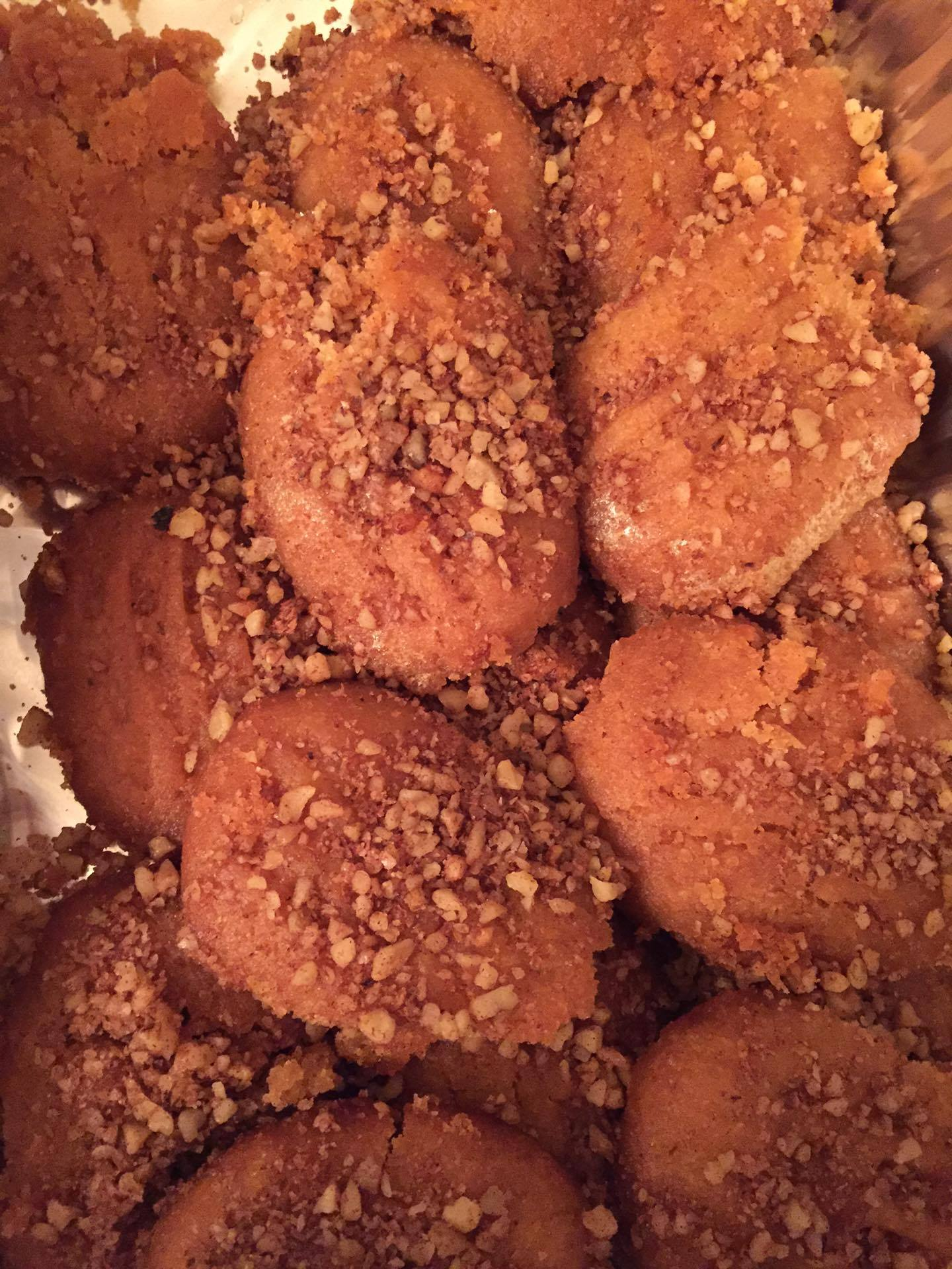 Melomakaronos frais